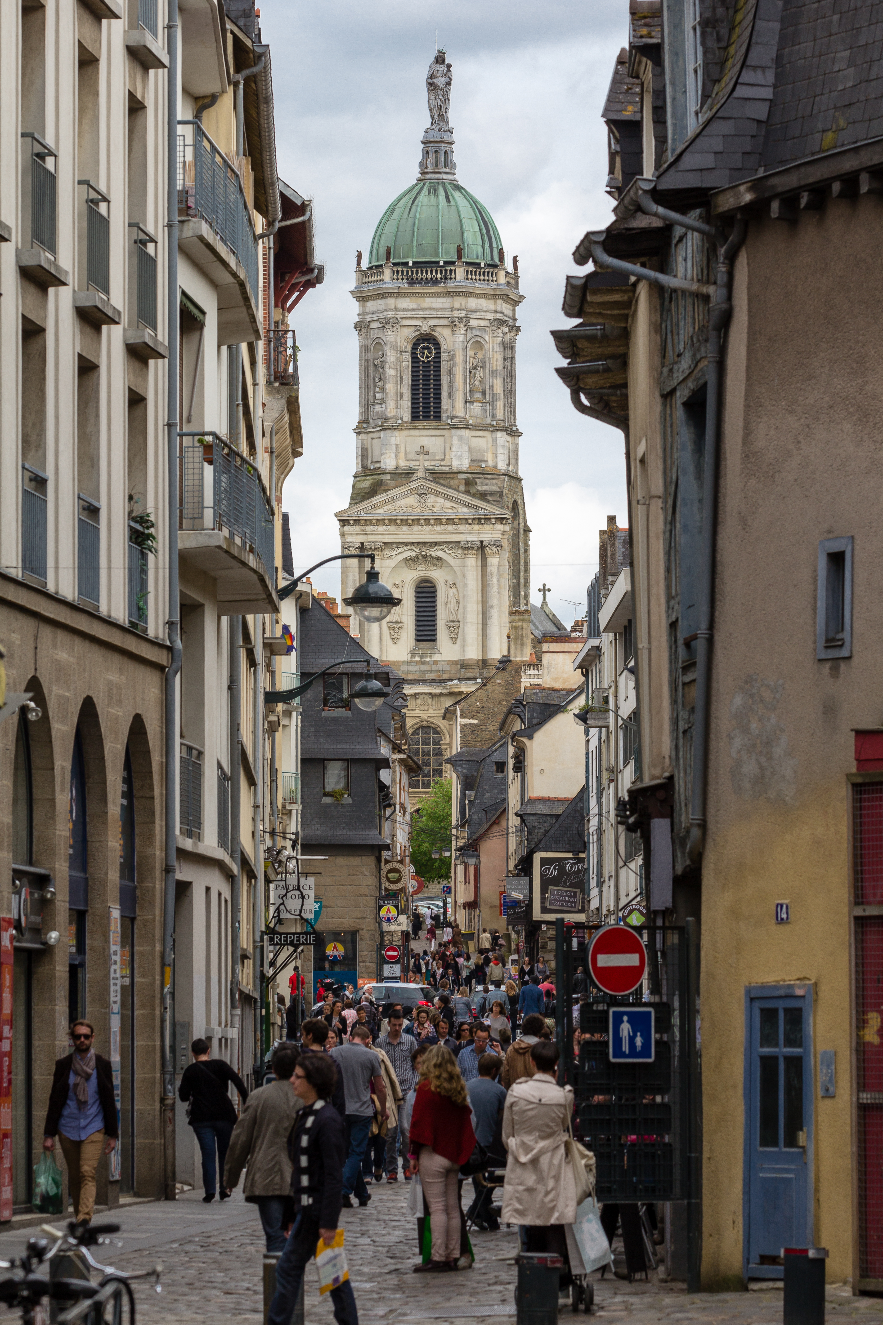 Perspective sur l'église Notre-Dame-en-Saint-Melaine depuis le contour Saint-Aubin à Rennes (France).